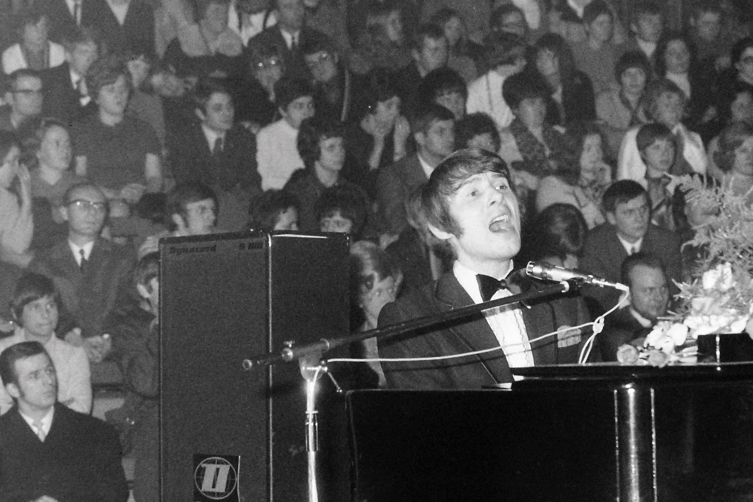 Udo Jürgens bei seinem Konzert im Januar 1970 in der Niederrheinhalle in Krefeld